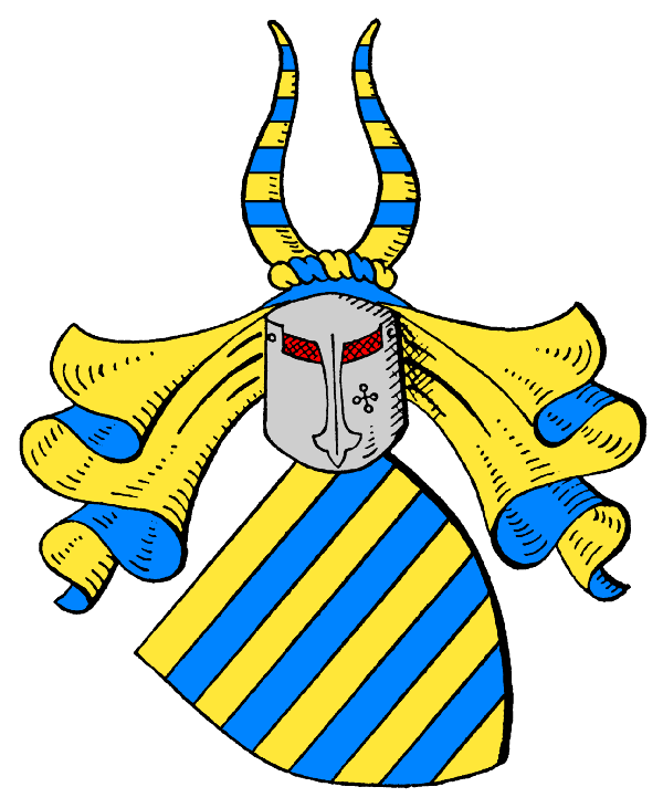 Wappen derer von Goltstein